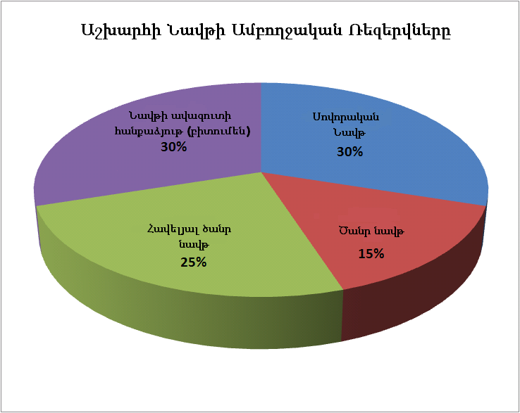 no original description